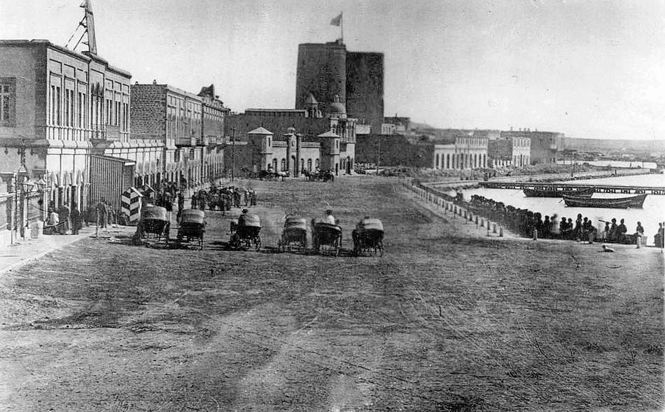 Баку. Александровская набережная.